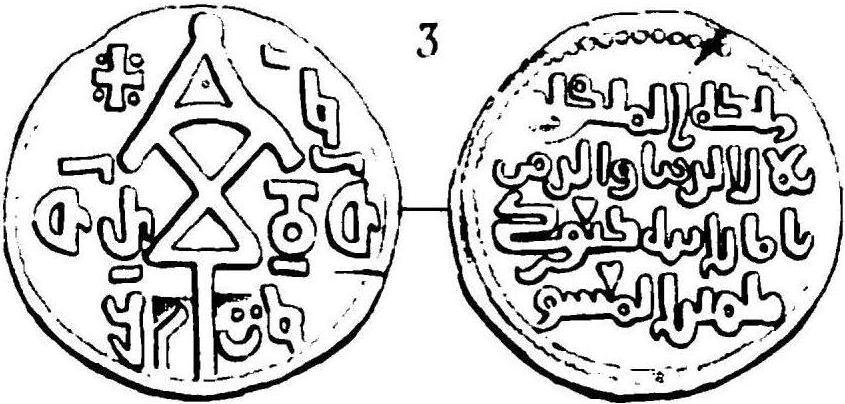 Victor Langlois. PL V.